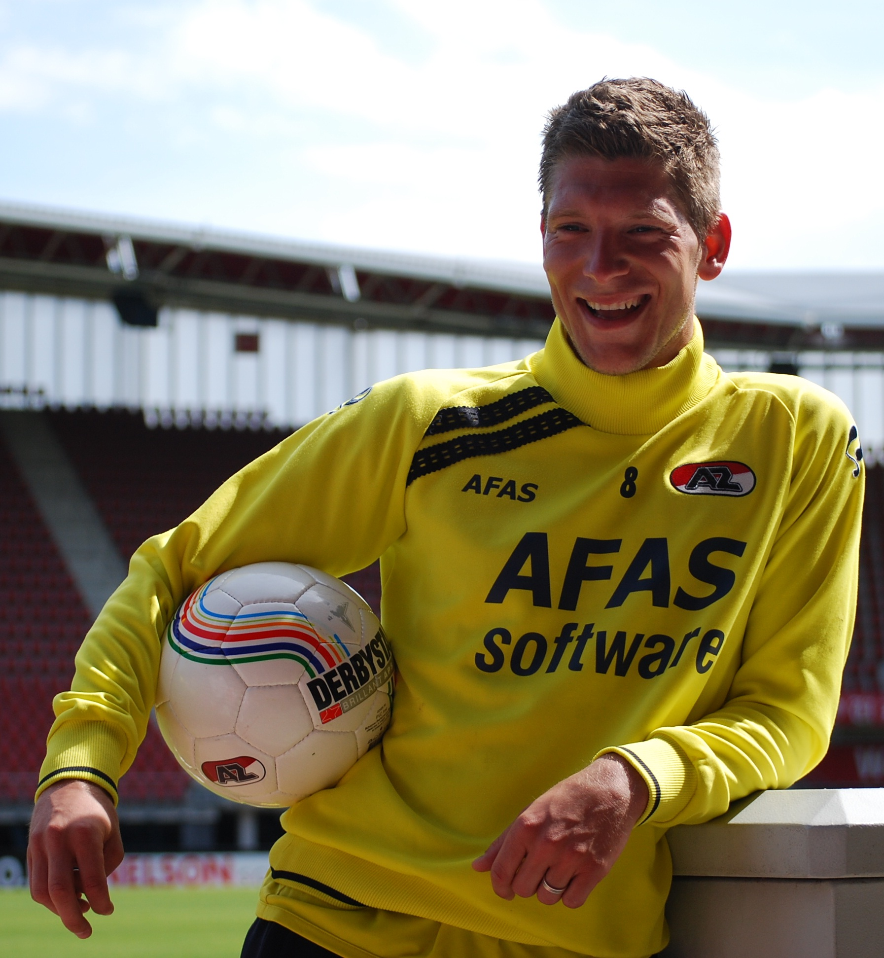 Deze foto van Stijn Schaars heb ik gemaakt na afloop van de training van 13 mei 2011